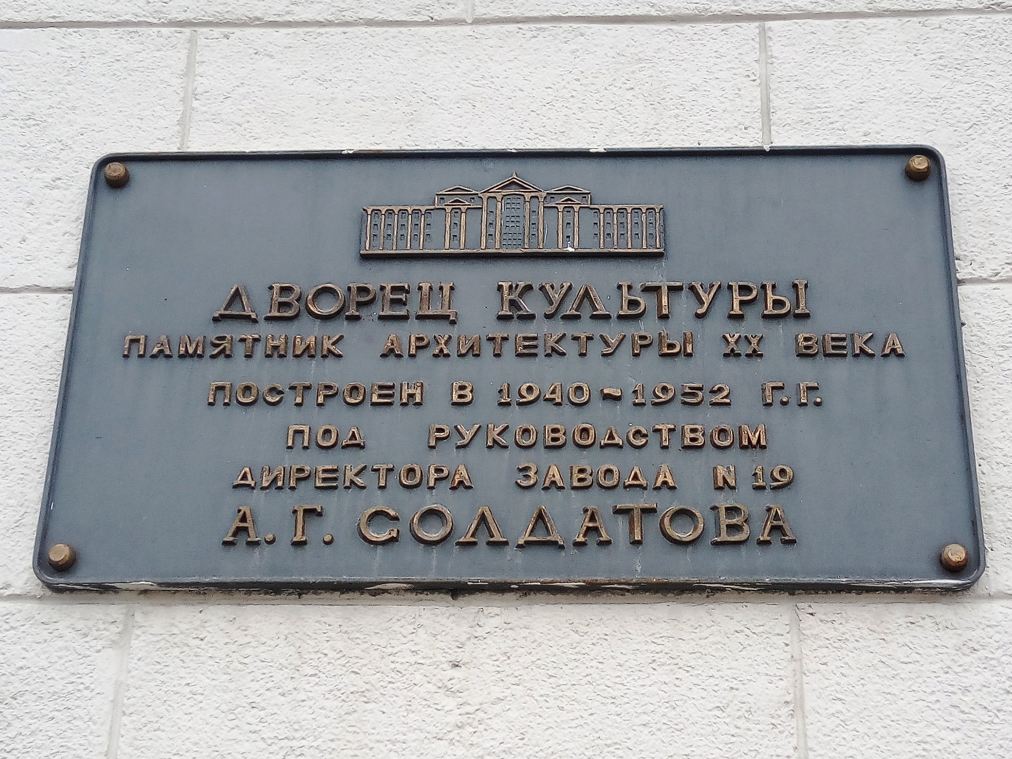 Аннотационная доска на фасаде дворца культуры им. А. Г. Солдатова